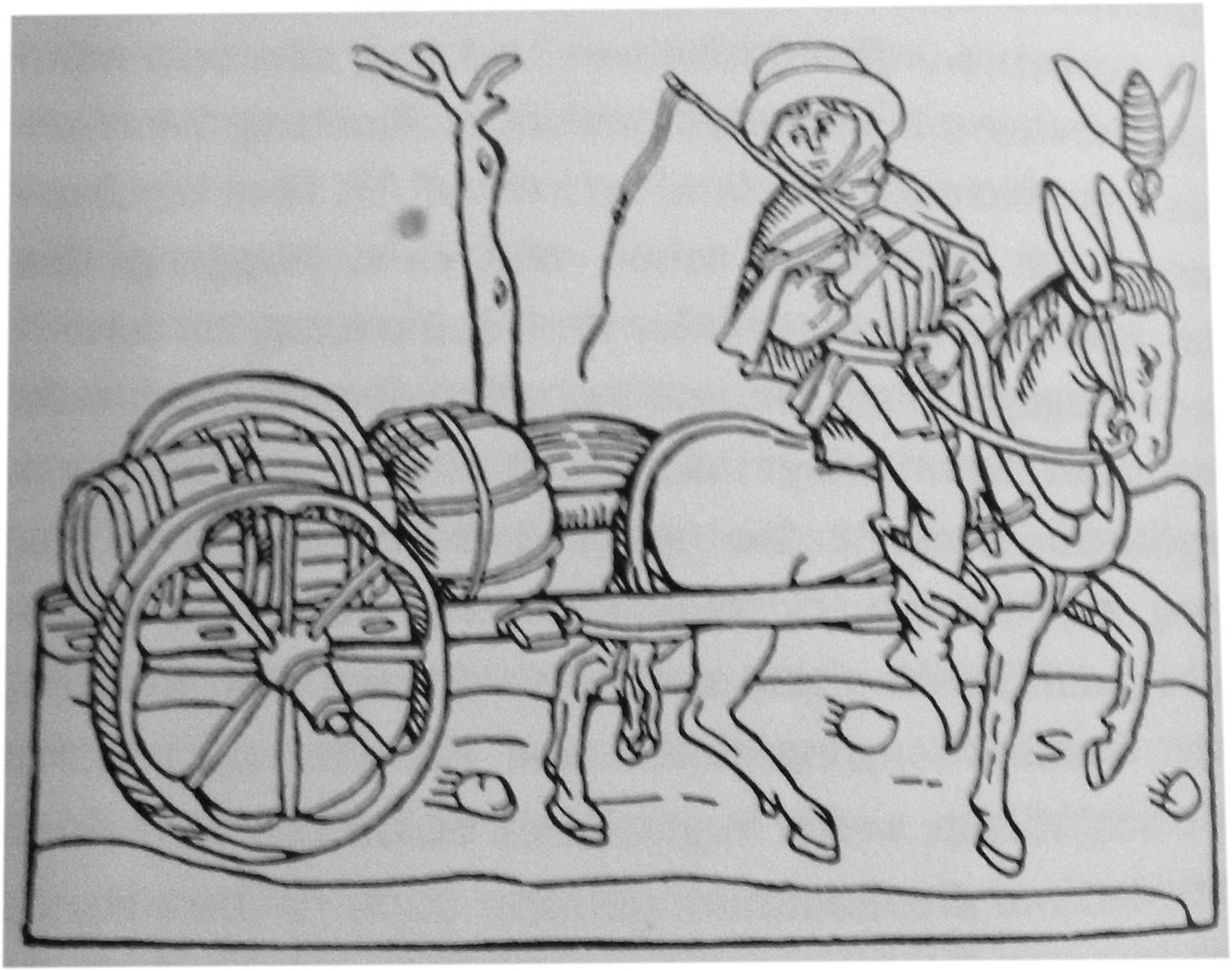 Holzschnitt eines mittelalterlichen Händler auf einen Anzwagen.